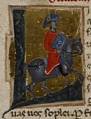 Guillem de Cabestany